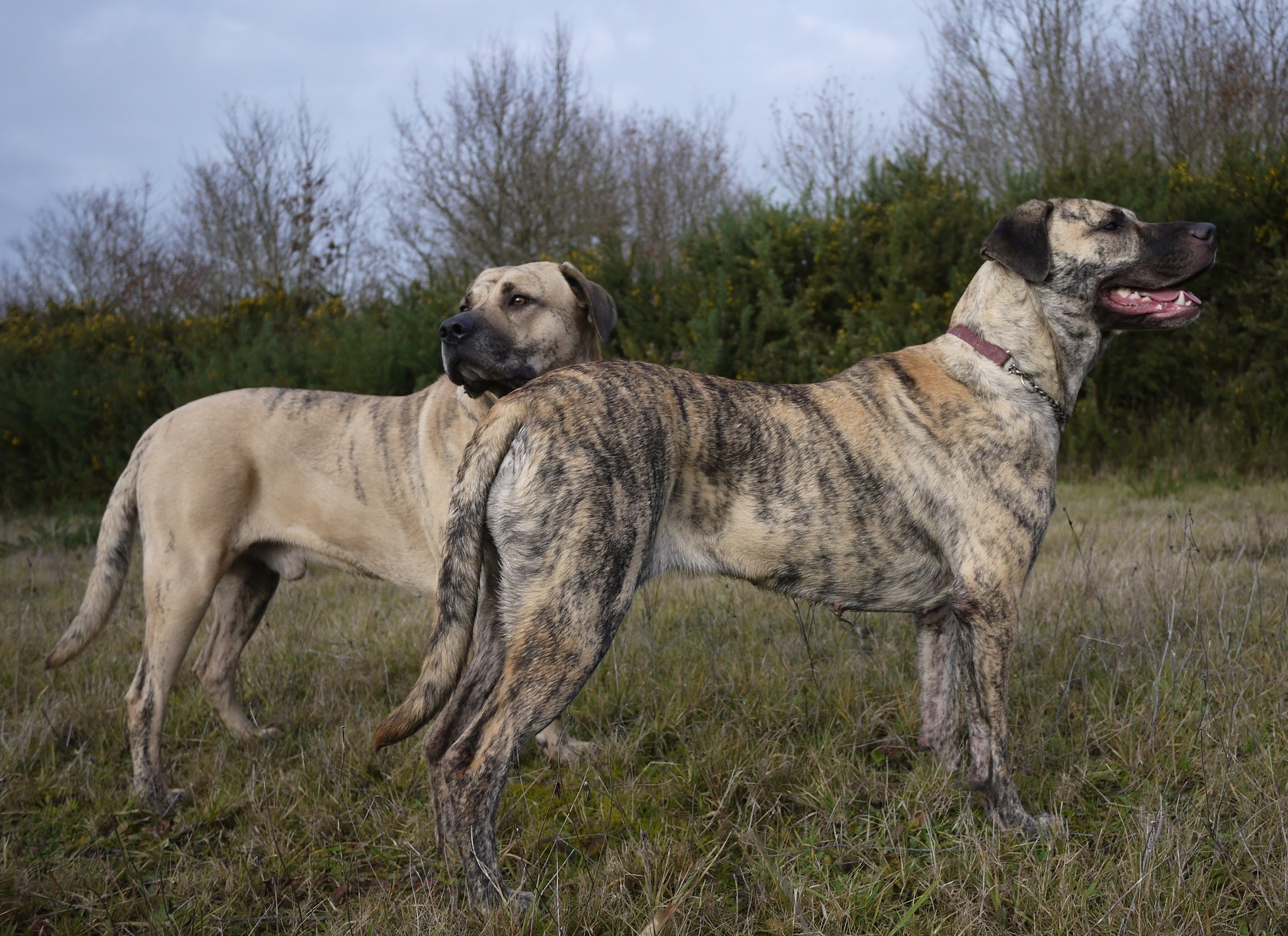 Cimarrón Uruguayo